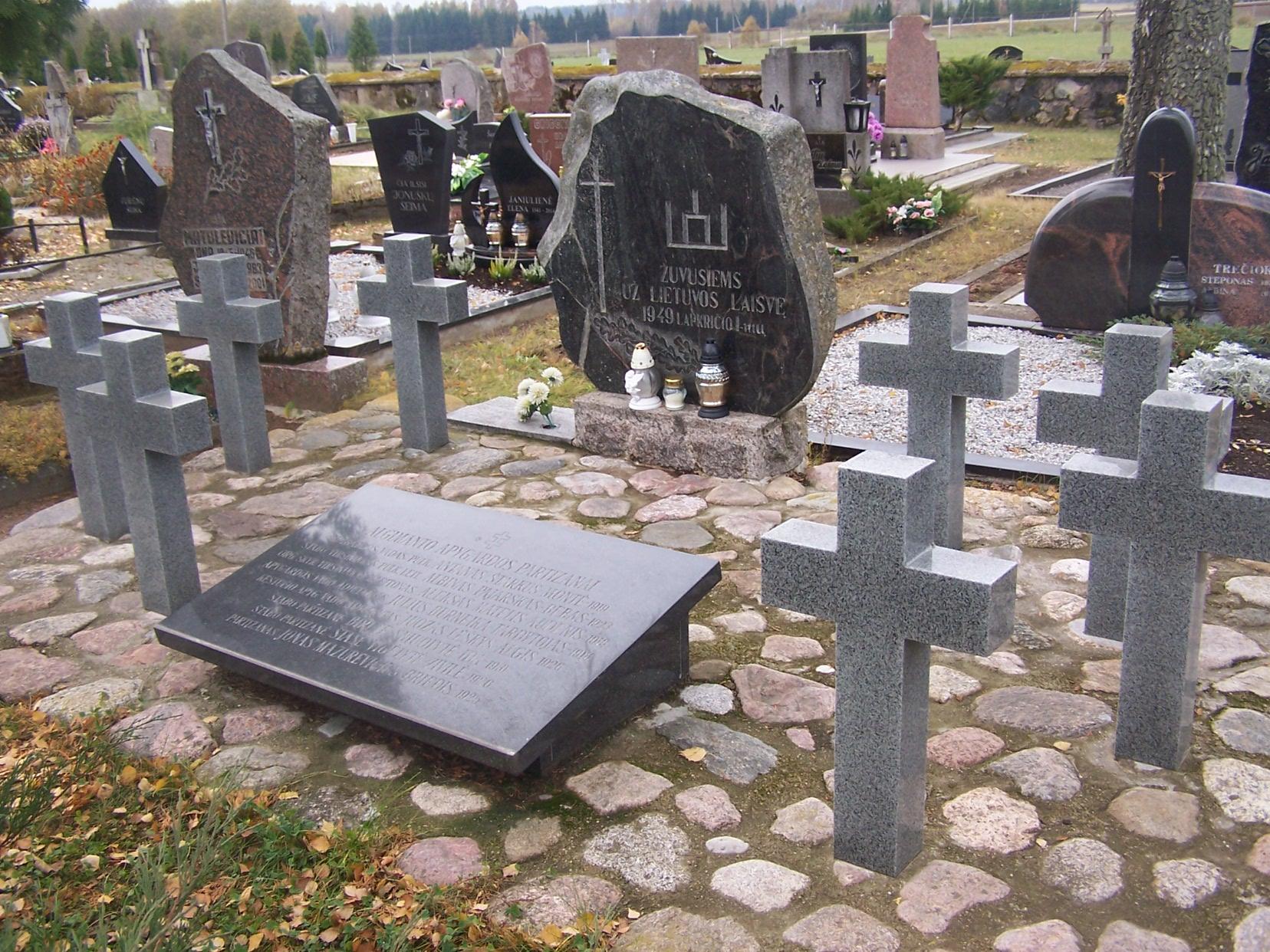 Algimanto apygardos partizanų vado Antano Starkus-Montės ir kitų partizanų kapas.